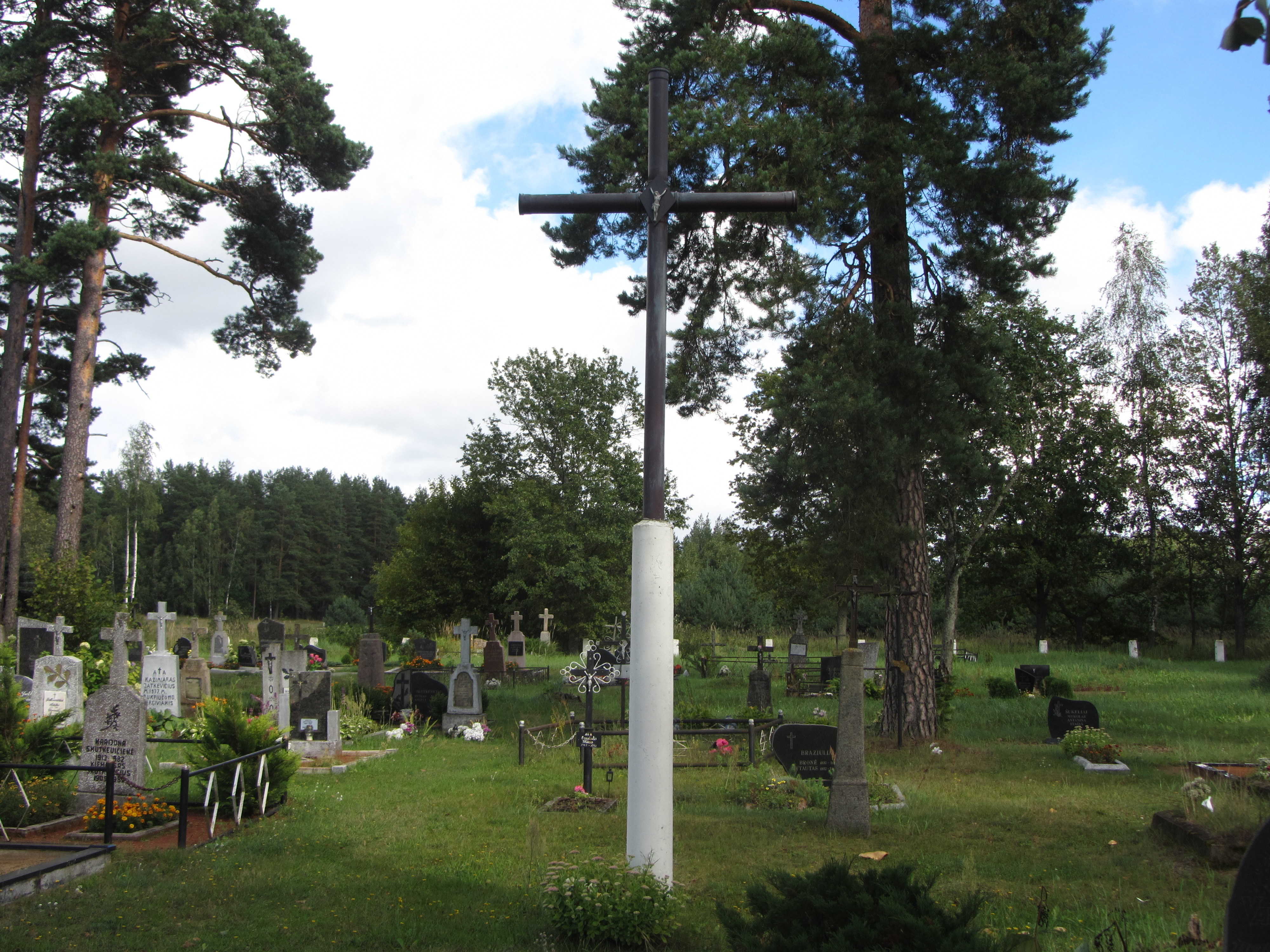 Gerkonys 30266, Lithuania